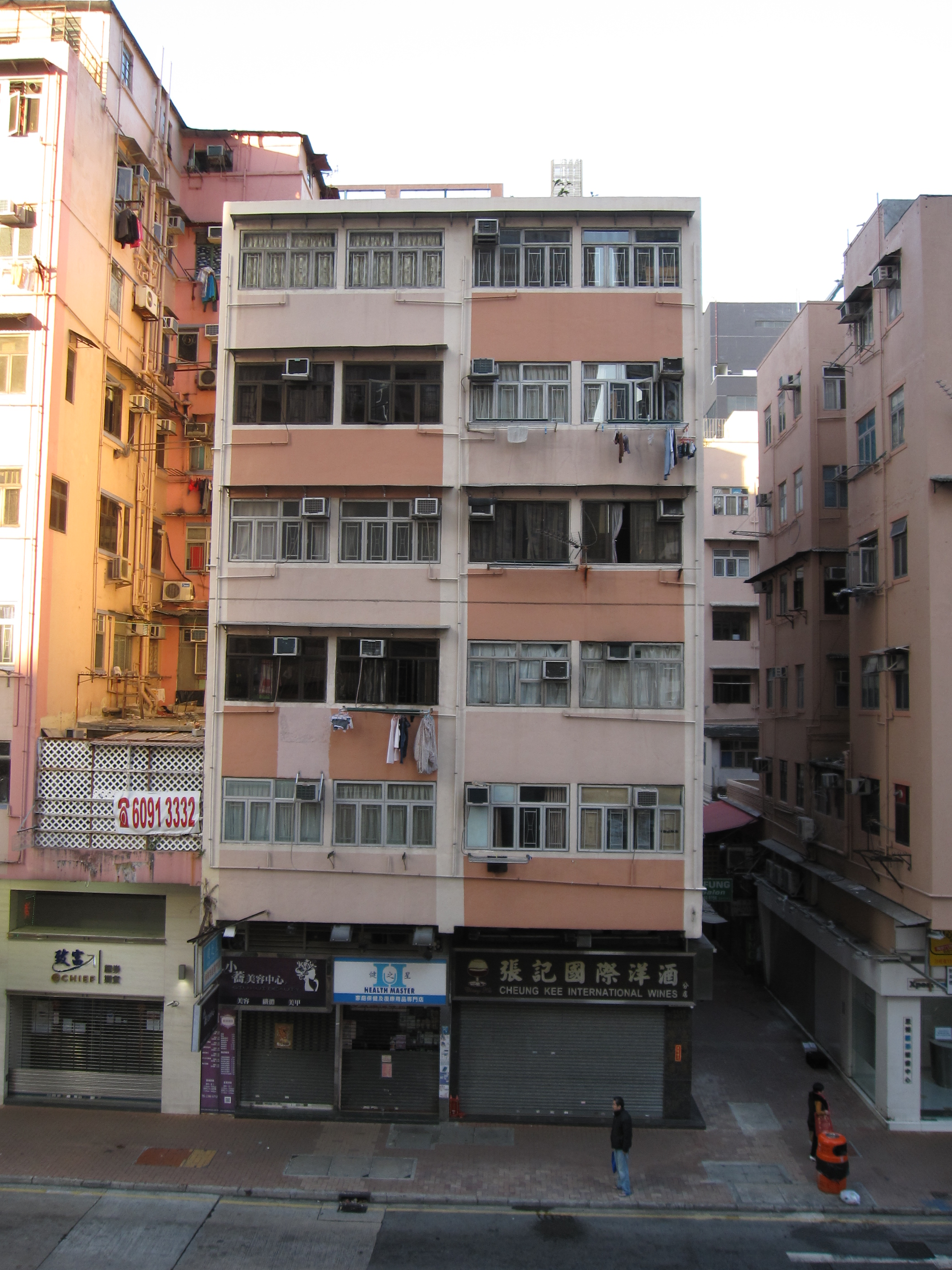 中文（香港）: 德仁唐樓第二期。